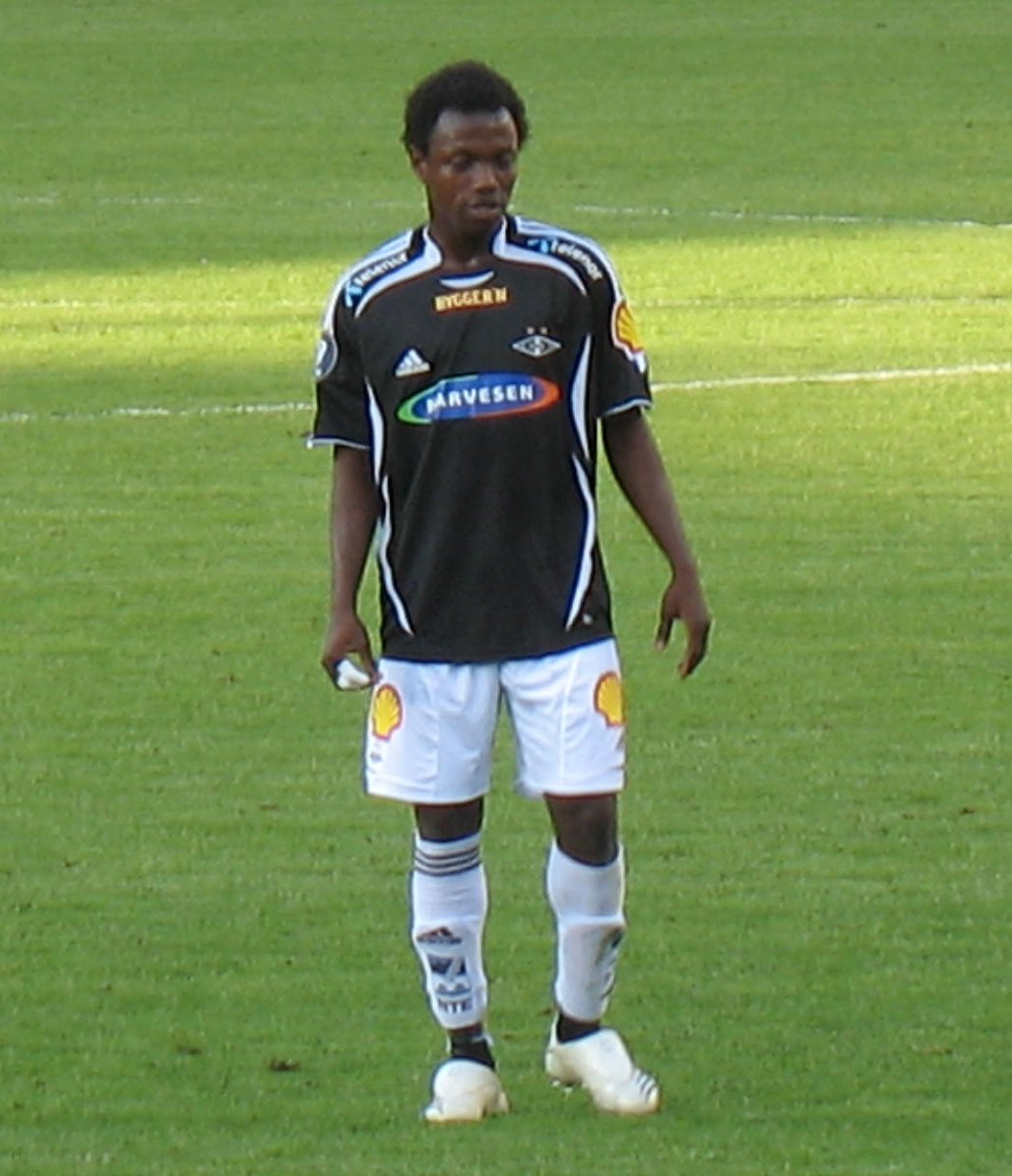 Fotballspilleren Abdoulrazak Traoré